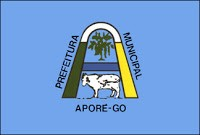 Bandeira do município goiano Aporé